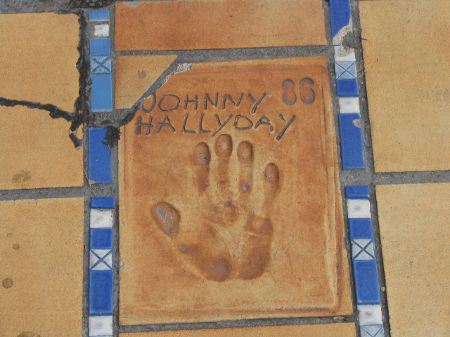 Handabruck von Johnny Hallyday in Cannes